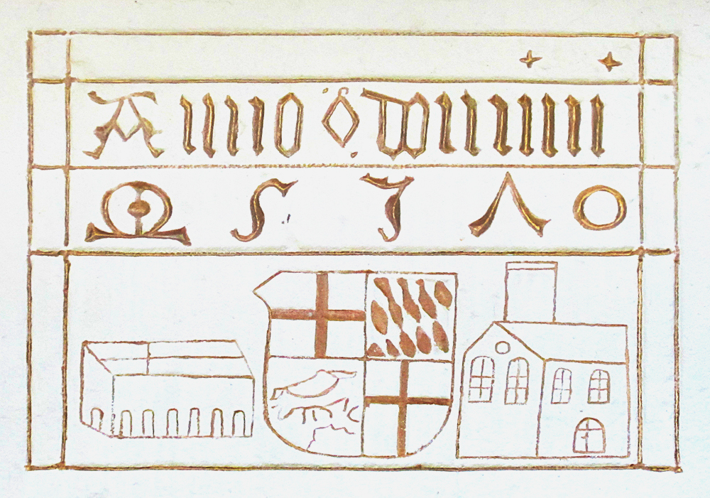 Sandsteinplatte mit Inschrift am Dieterskirchel in Rülzheim